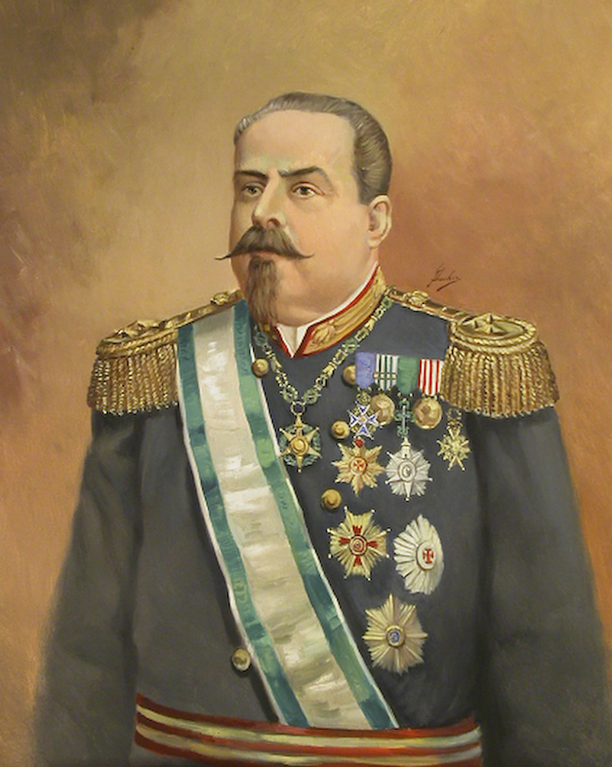 Imagem do General Francisco Maria da Cunha